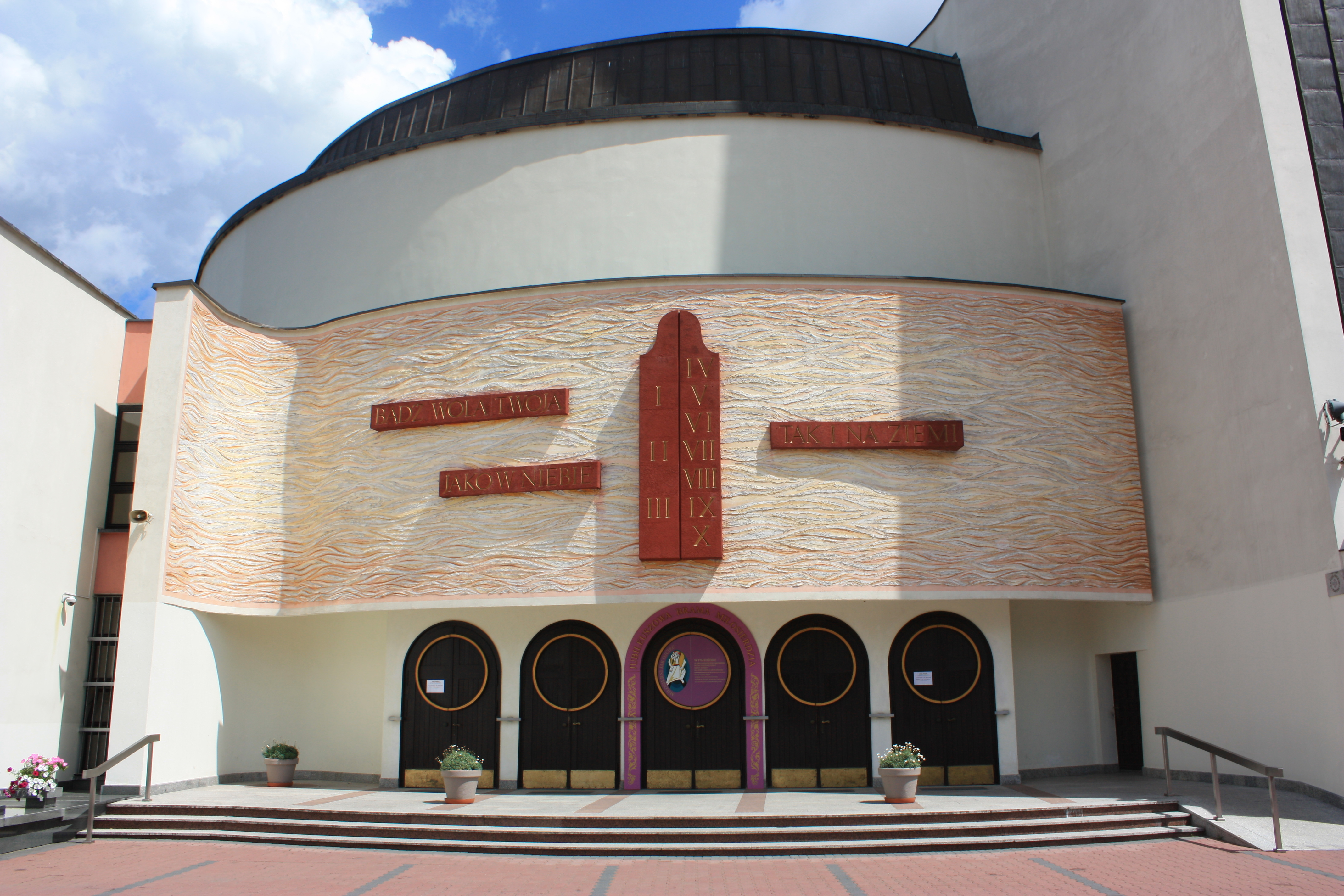 Fasada kościoła Świętej Rodziny w Poznaniu.